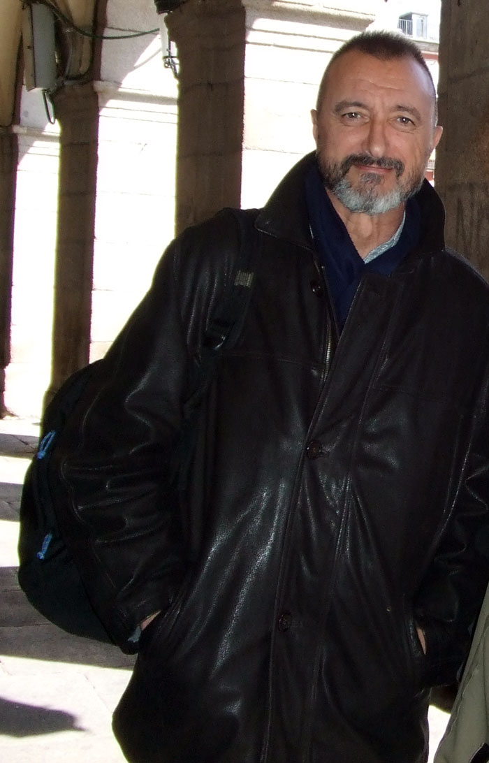 El escritor Arturo Pérez-Reverte en la céntrica Plaza Mayor de Madrid.